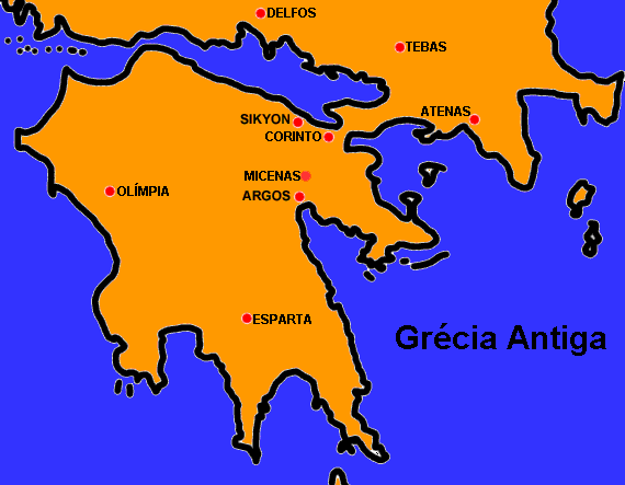 Grécia antiga, mera tradução de Image:Greece,ancient.gif